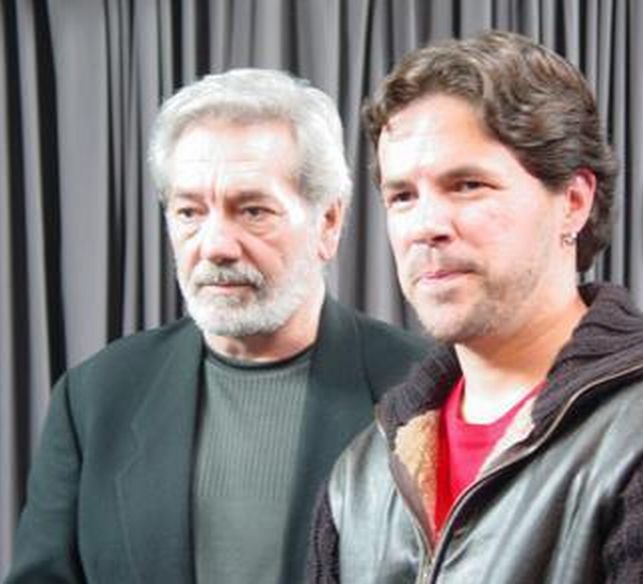 César e Pedro Camargo Mariano, músicos brasileiros (Rio, 2005)